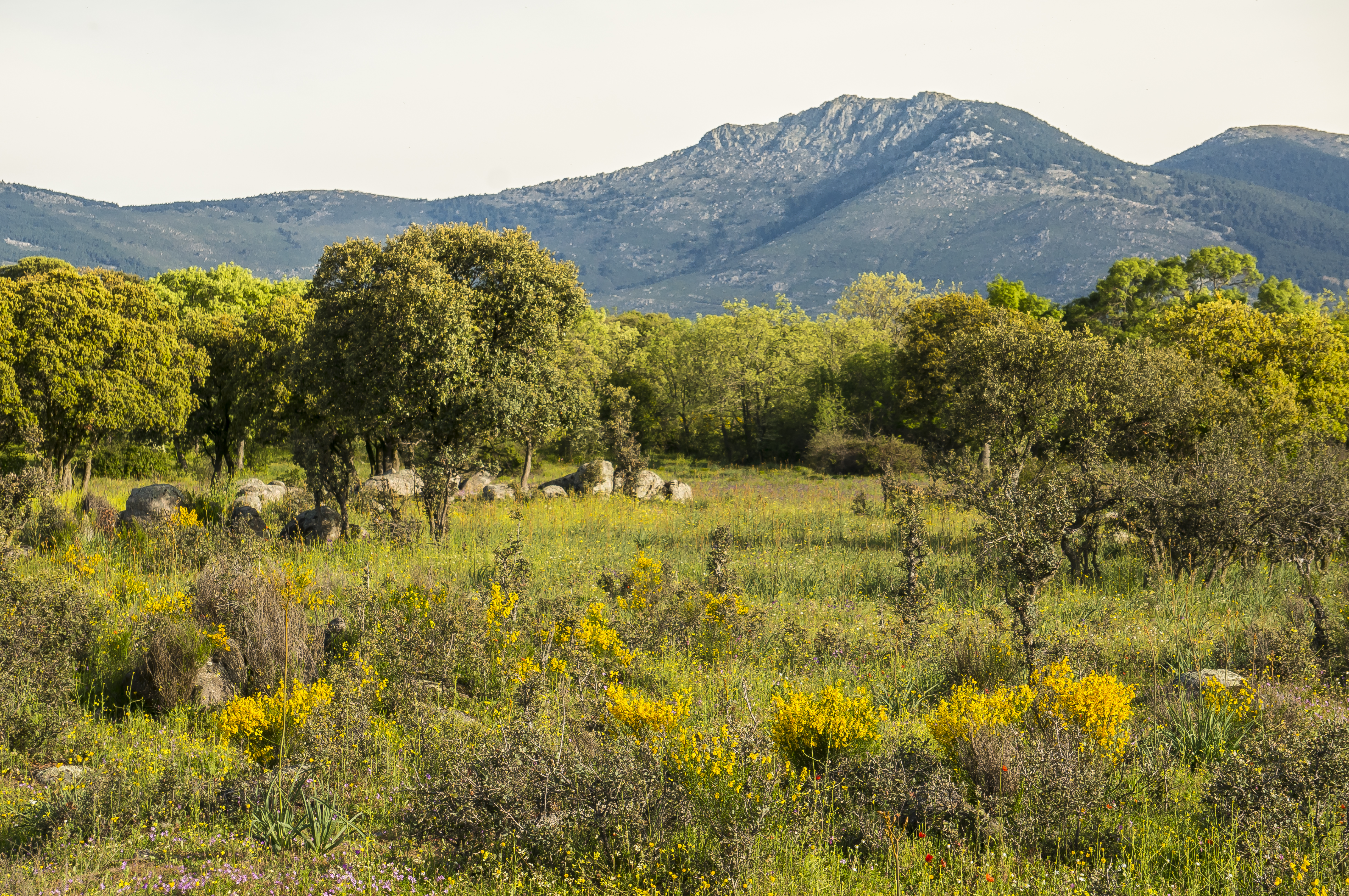 Paisaje en la Comunidad de Madrid